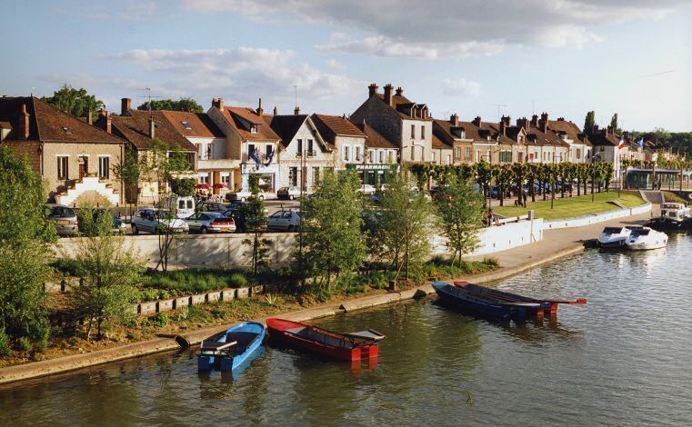 Quais de Seine de Saint-Mammès